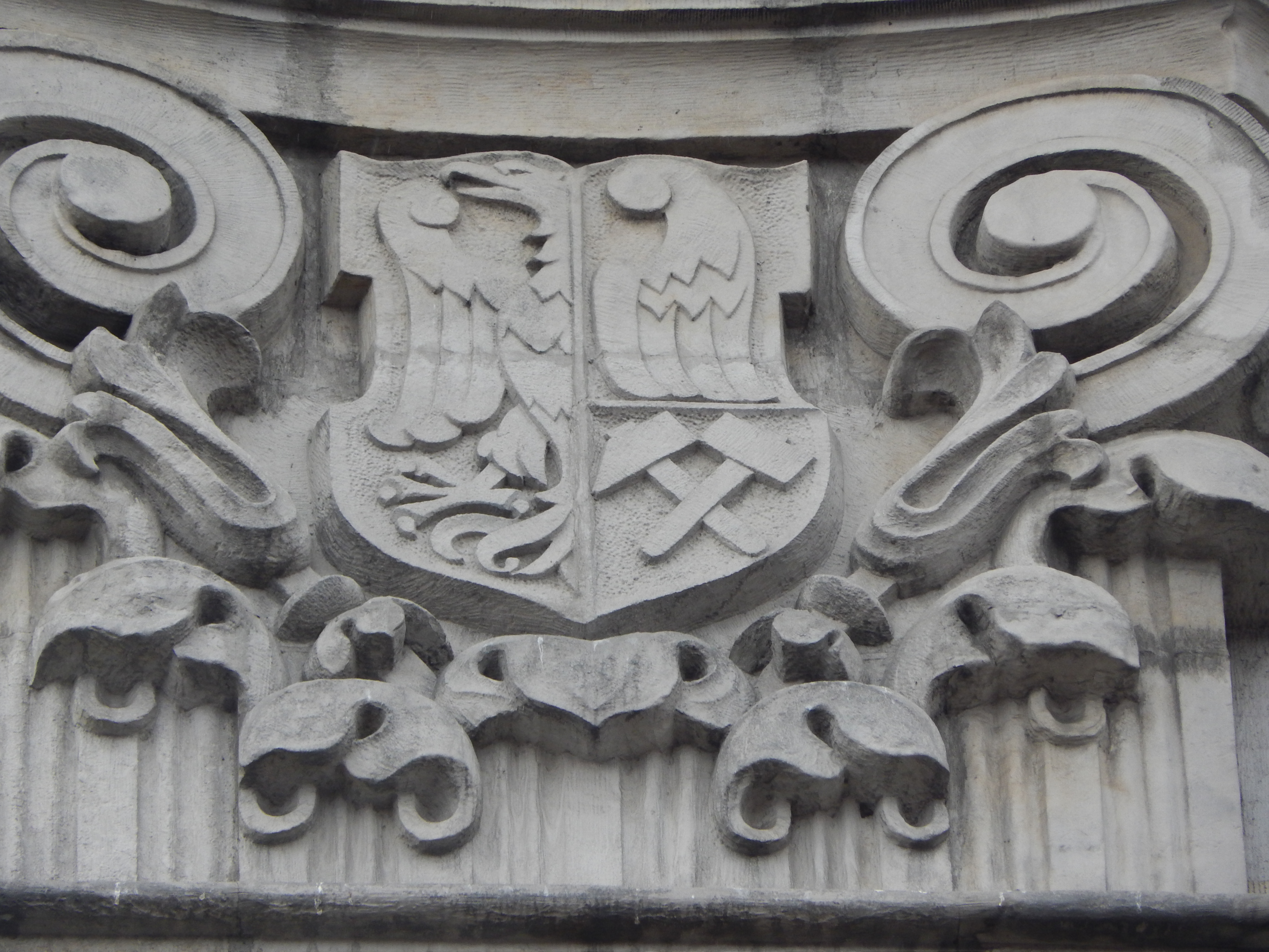 Fragment elewacji gmachu Sejmu Śląskiego - herb Tarnowskich Gór